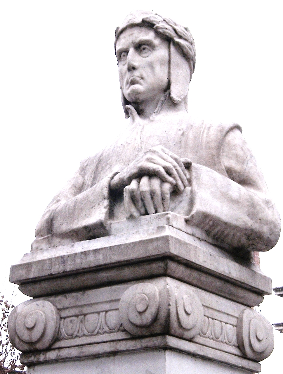 Estatua de Dante Imagen del busto de Dante Alighieri, en mármol, del escultor Erminio Blotta, en el Bv. Oroño, de la ciudad de Rosario (Argentina). Foto de Luis A. Blotta Stengel.